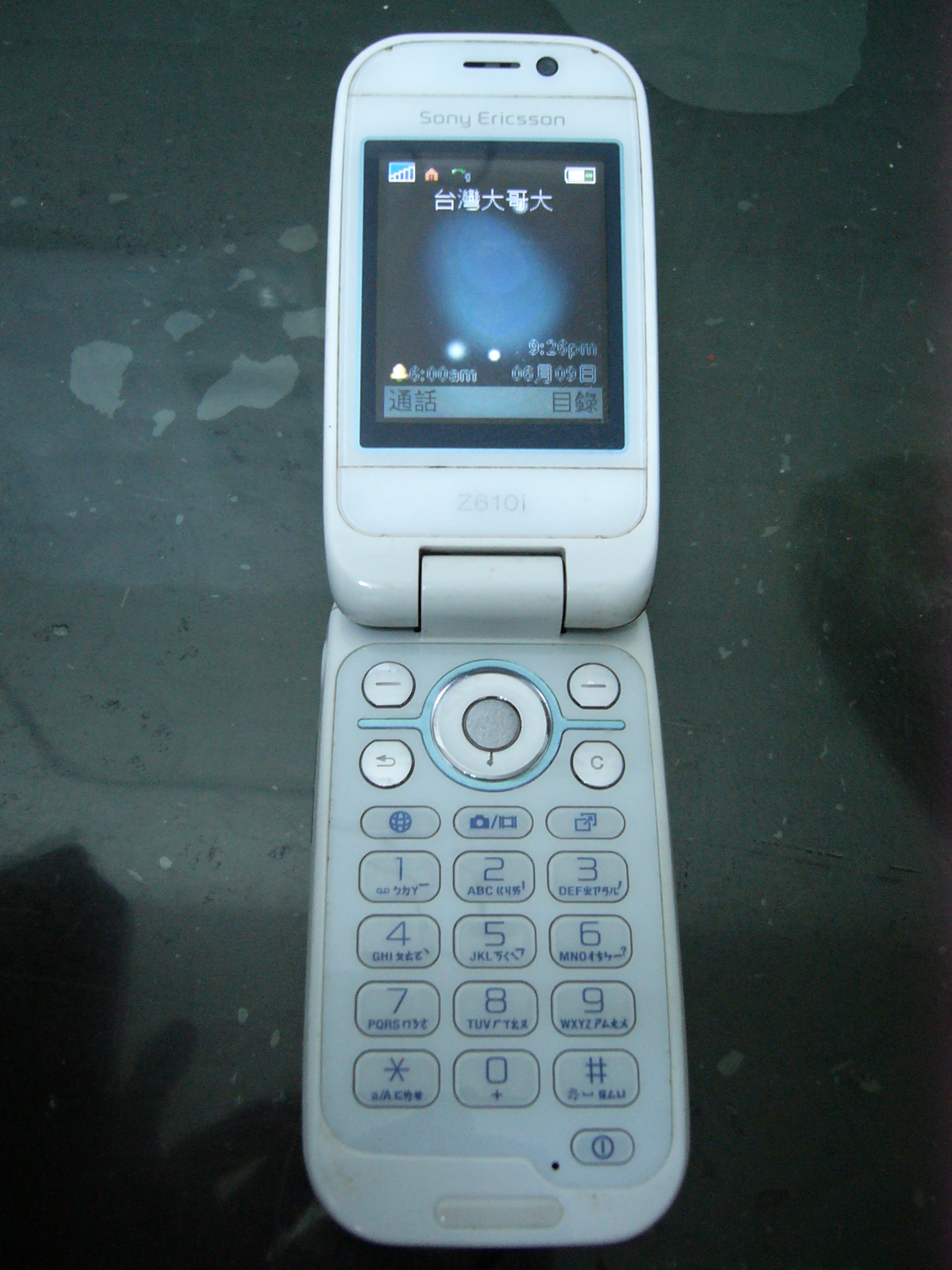 2007年Sony Ericsson Z610i行動電話天藍(Airy Blue)版面板